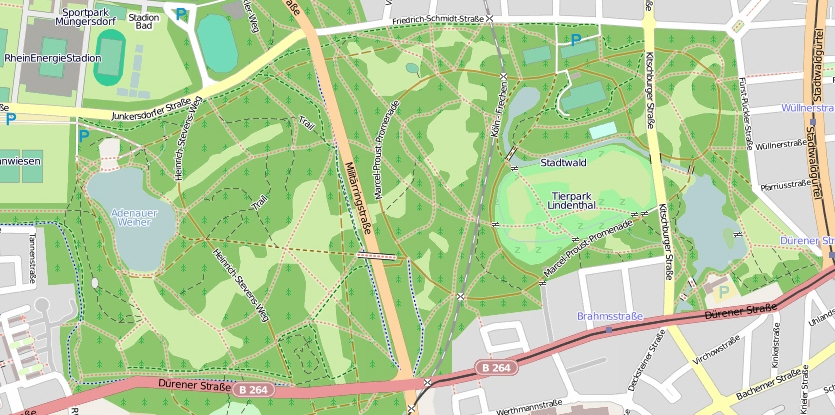 Stadtwald in Köln